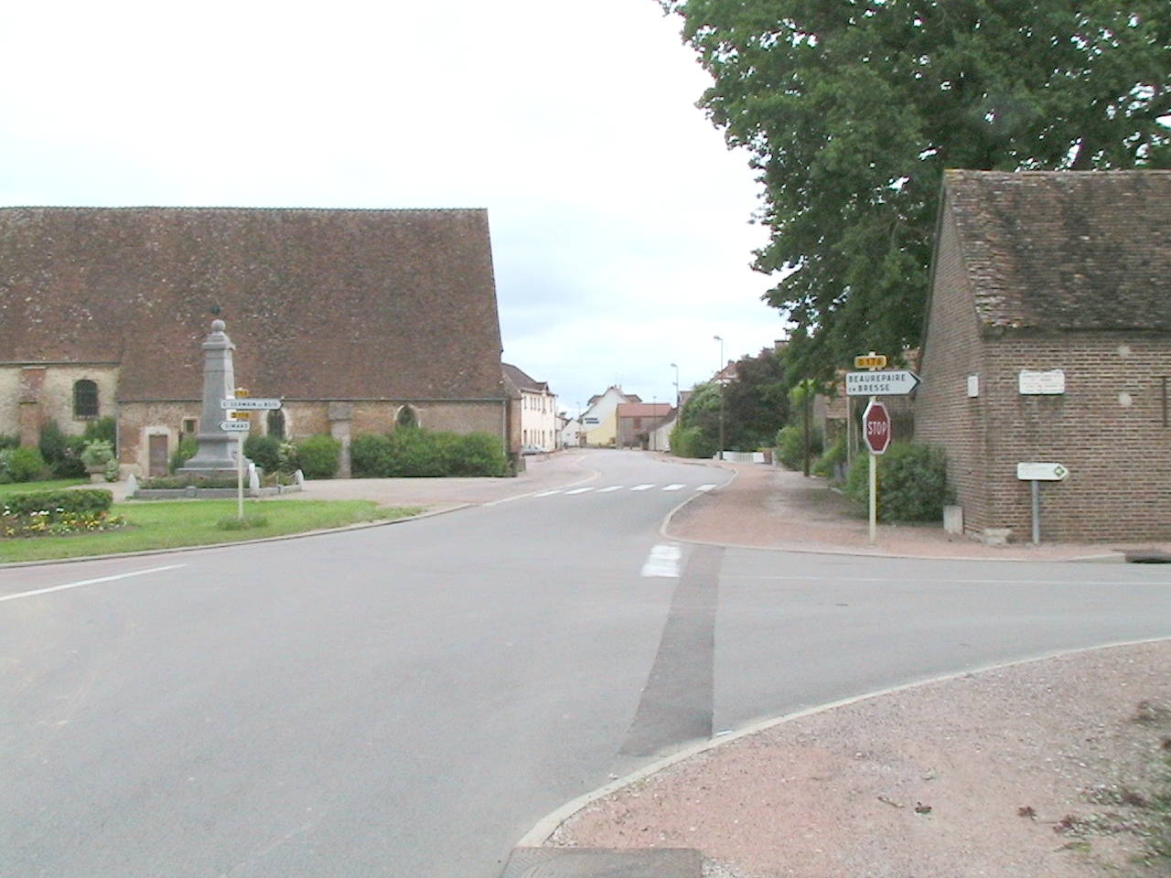 Photo prise le 28 mai 2006.